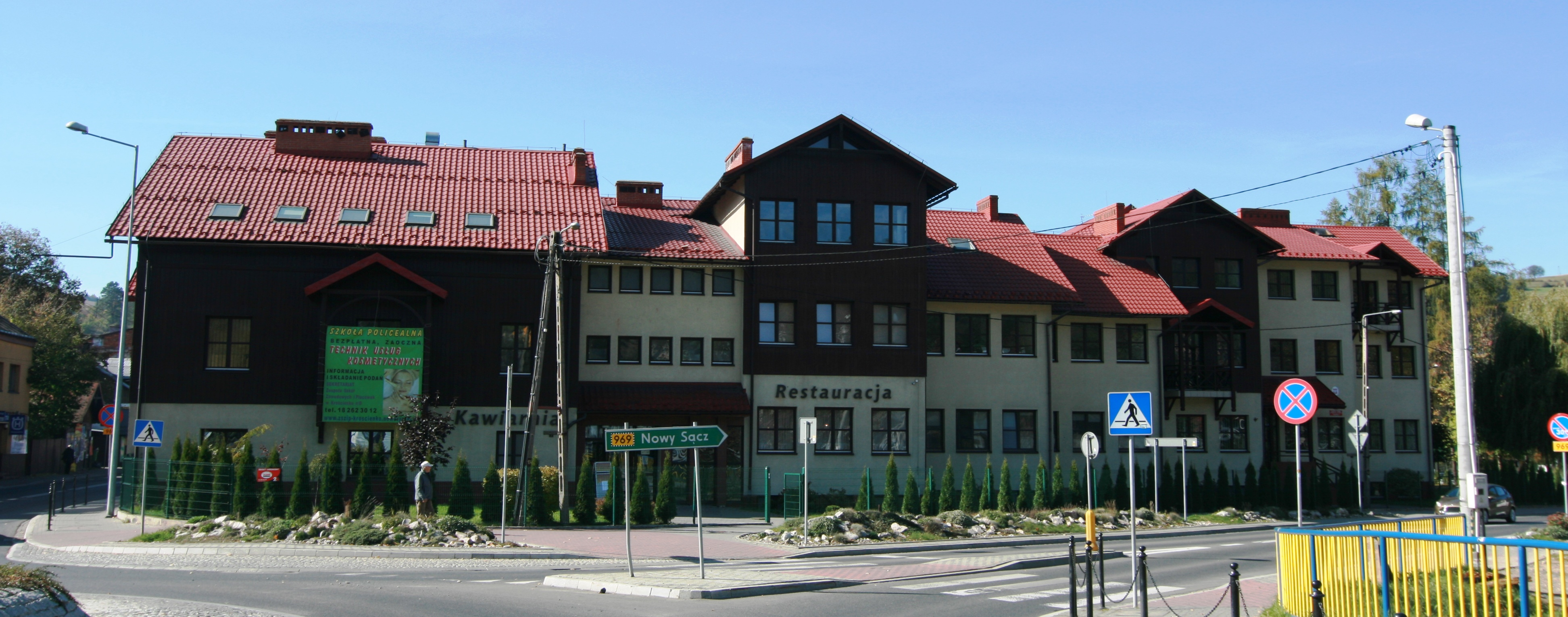 Narożny dom na rondzie będącym skrzyzowaniem ulic Jagiellońskiej i Sobieskiego. W domu tym była przed wojna restauracja "Trzy Korony"